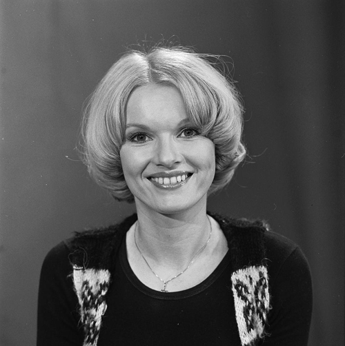 Martine Bijl